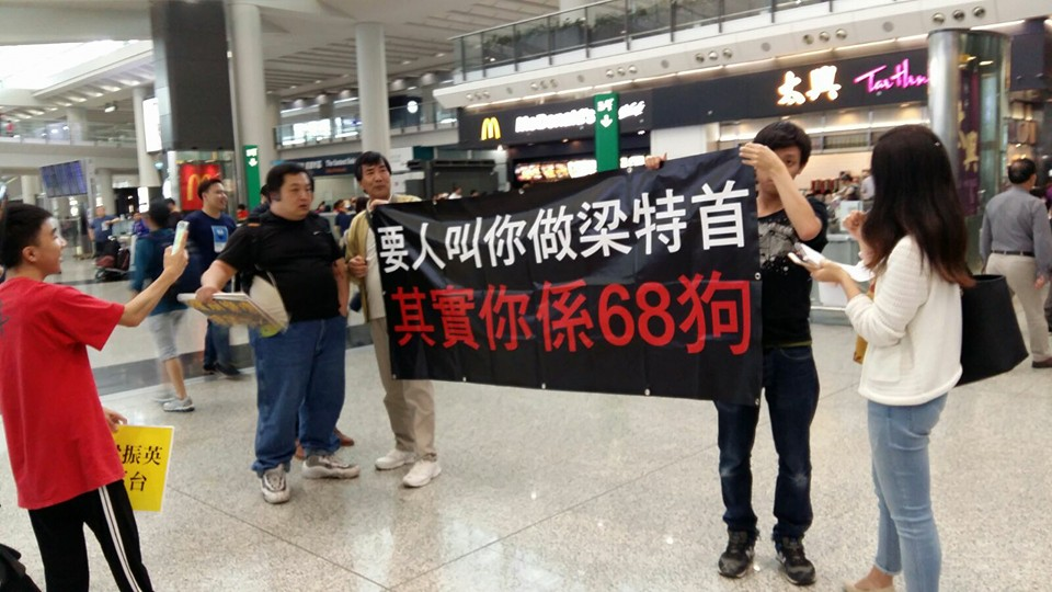 Dickson in HKIA